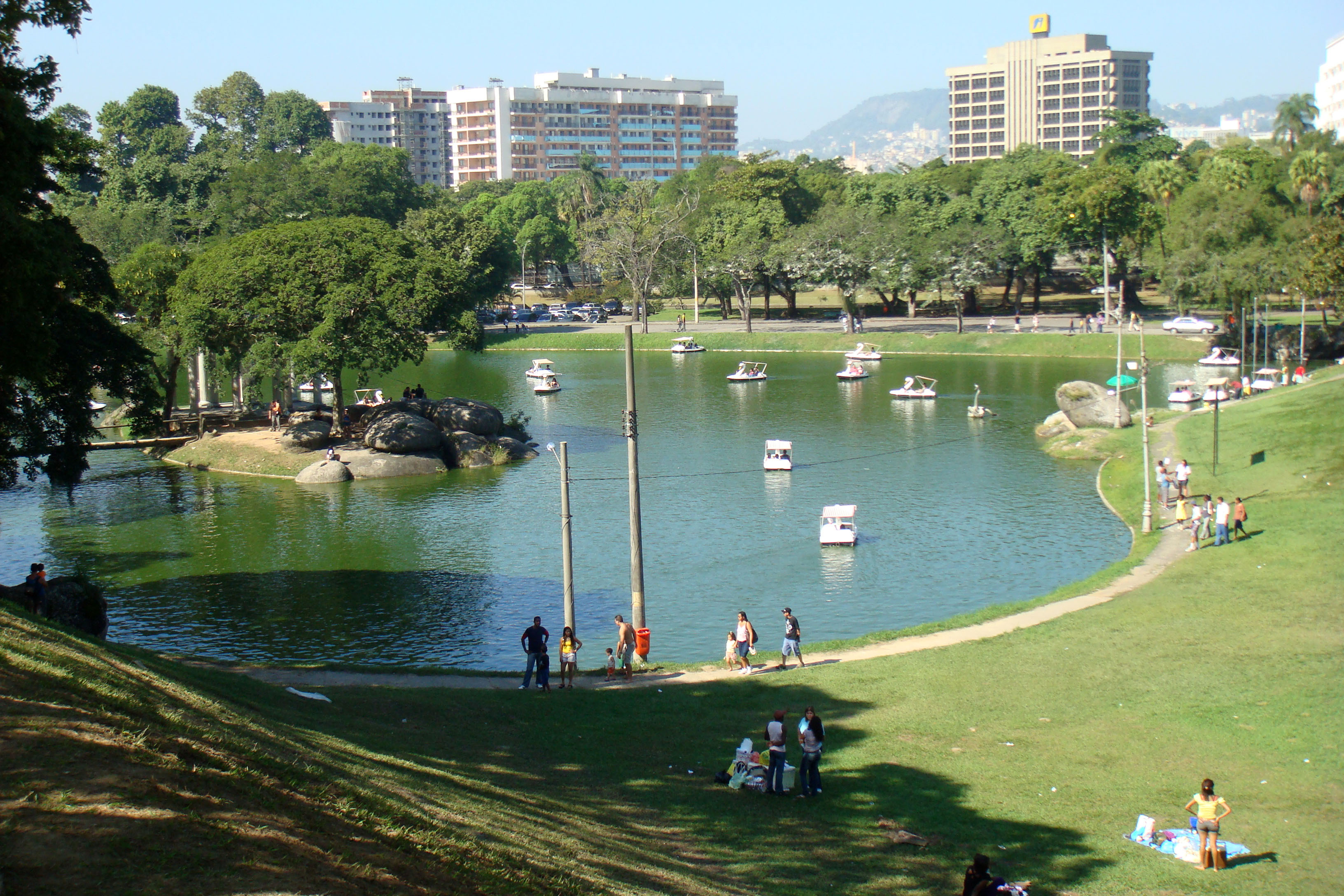 Quinta da Boa Vista - Lago Maior com os Pedalinhos